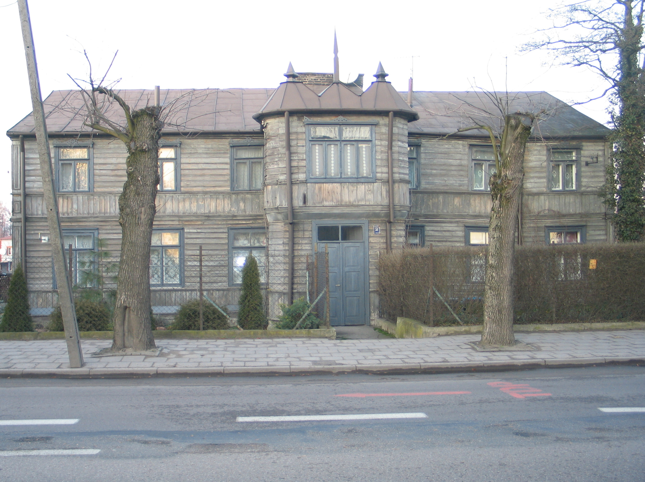 Dom drewniany piętrowy przy ulicy Warszawskiej 51 w Mławie. Mława, woj. mazowieckie, Polska. Autor: Robert Bierwiaczonek 2006-12-24